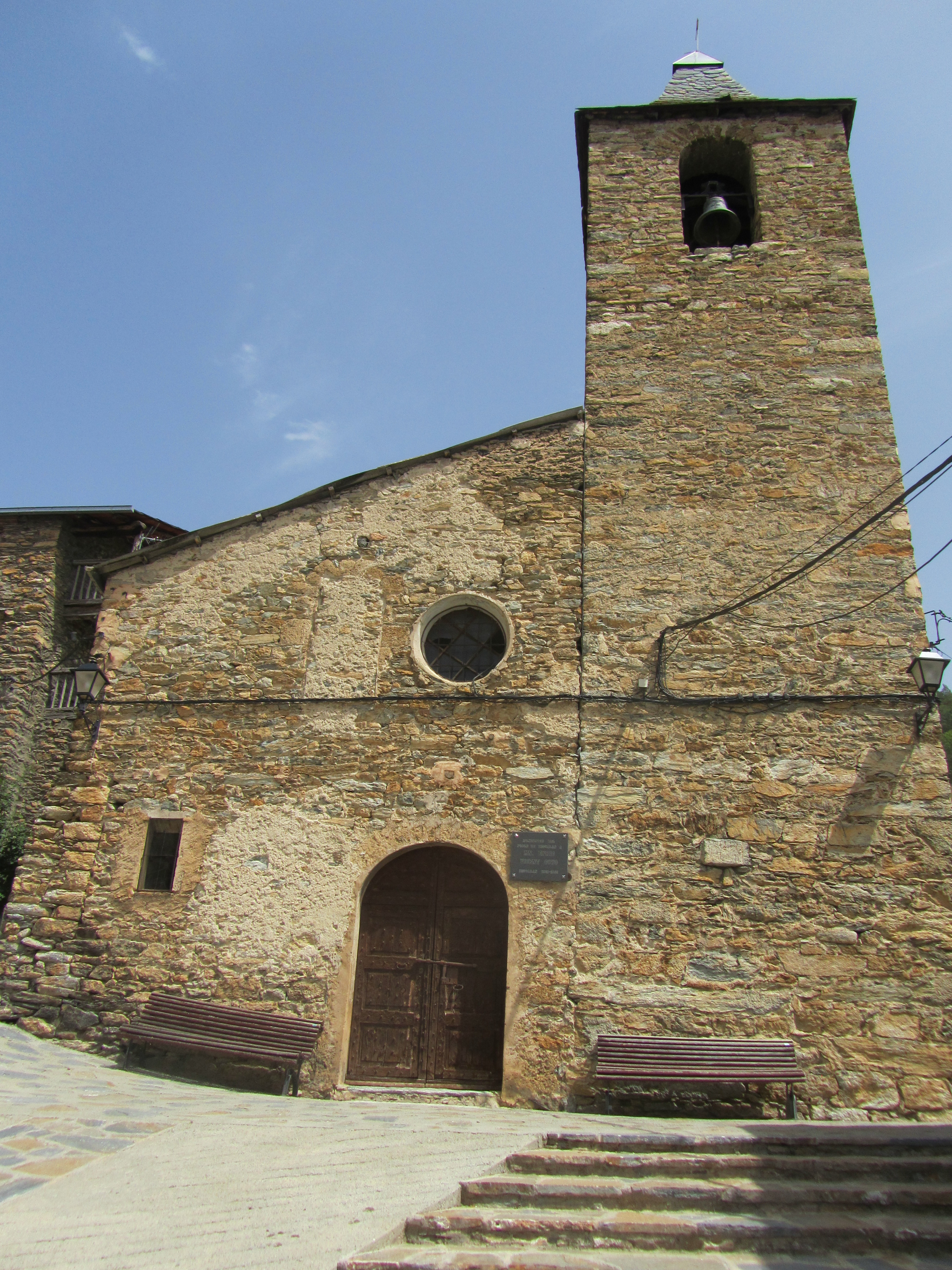 Iglesia parroquial de San Martín en Bescaran. Ciudad de los Valles de Valira. Alto Urgel. Cataluña. Spain